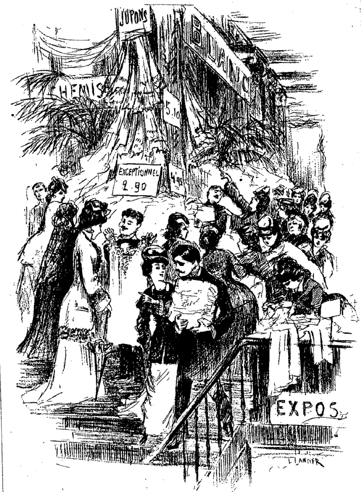 Illustration de Au Bonheur des Dames tirée des Œuvres complètes illustrées de Émile Zola, T1, Fasquelle, 1906, Le jour du Blanc p.377